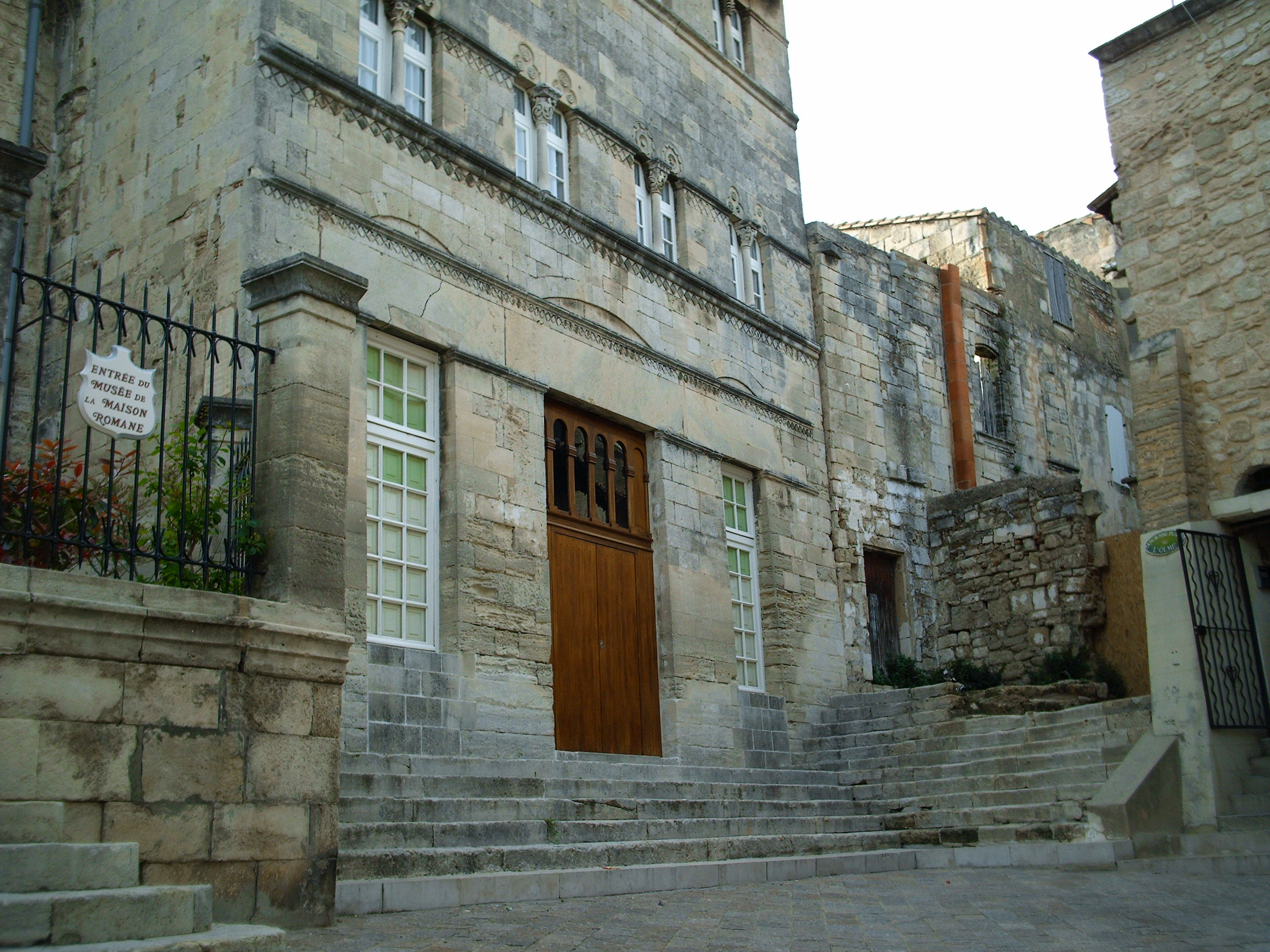 Maison romane de Saint-Gilles (Gard, France)